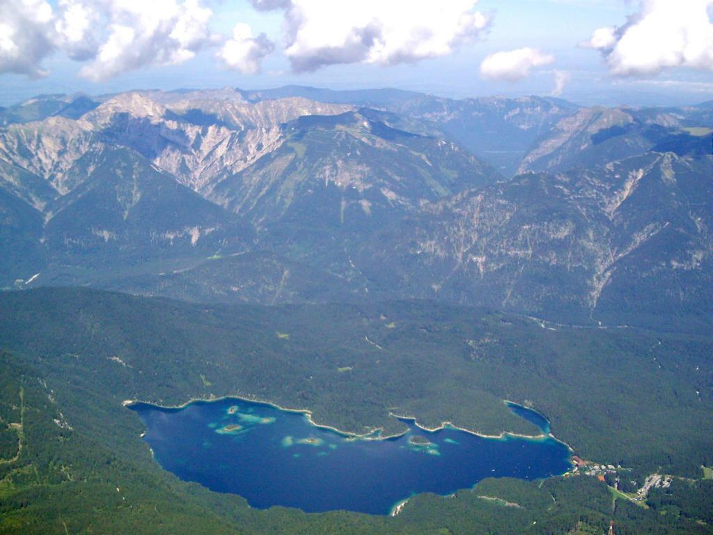 Blick von der Zugspitze auf den Eibsee